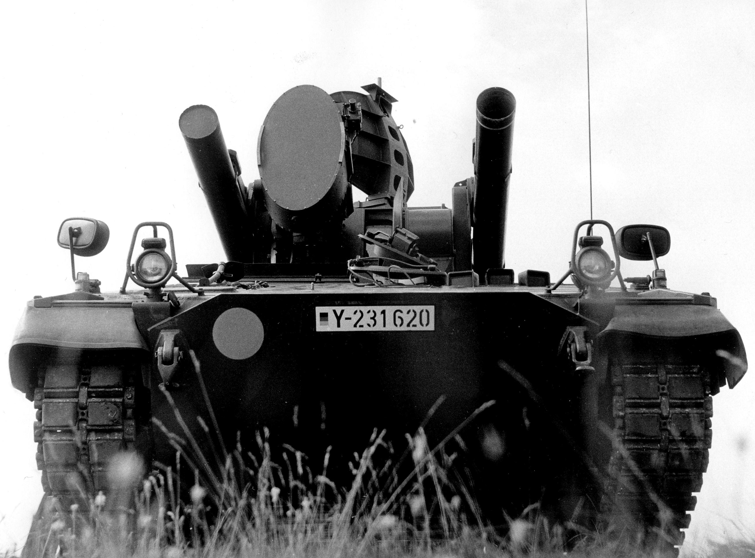 FlaRakPz Roland auf modifiziertem Fahrgestell des Spz Marder (TrVsuM)